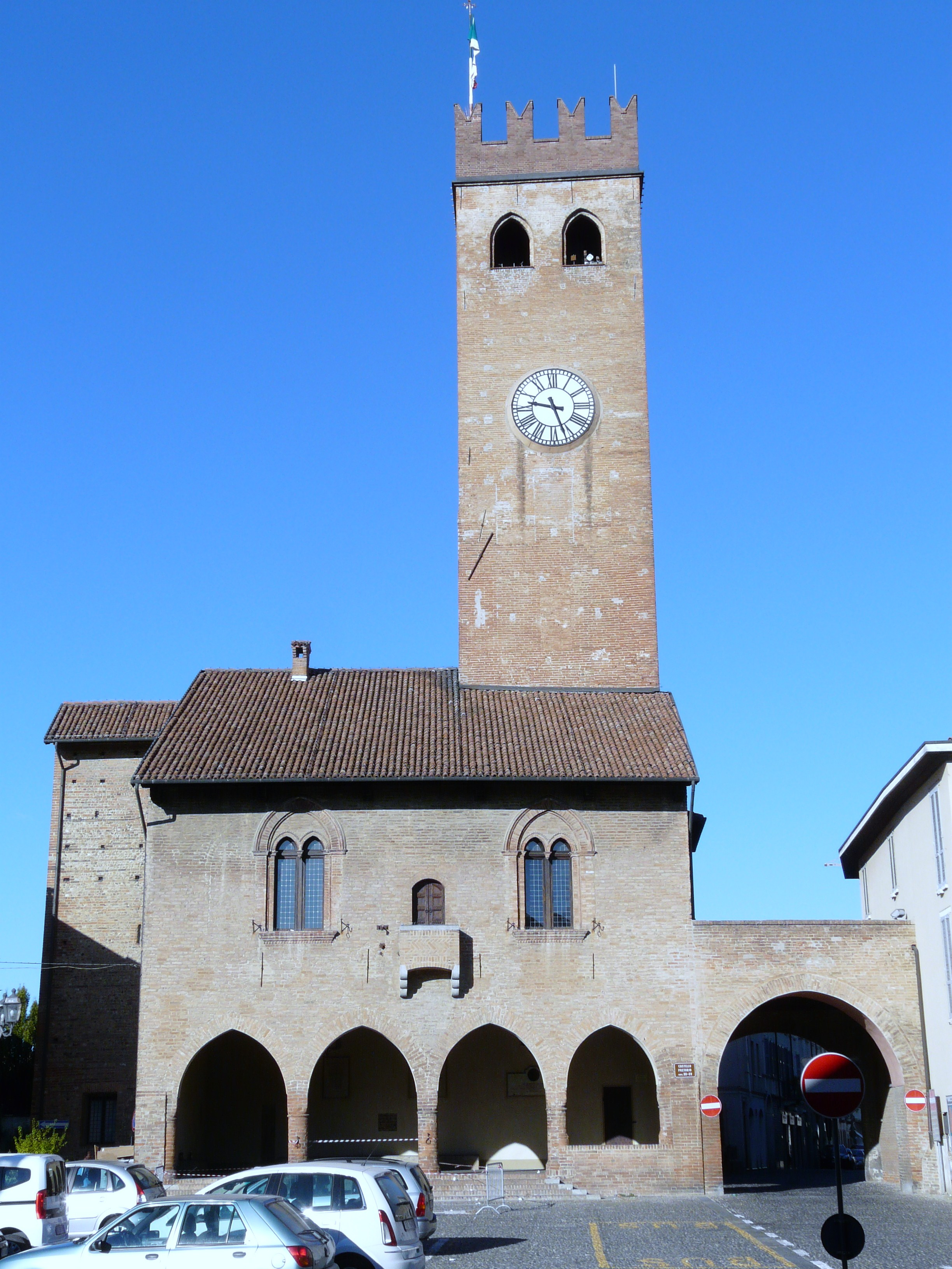 Palazzo Pretorio (castello dei Torriani e Bandello), Castelnuovo Scrivia, Piemonte, Italy